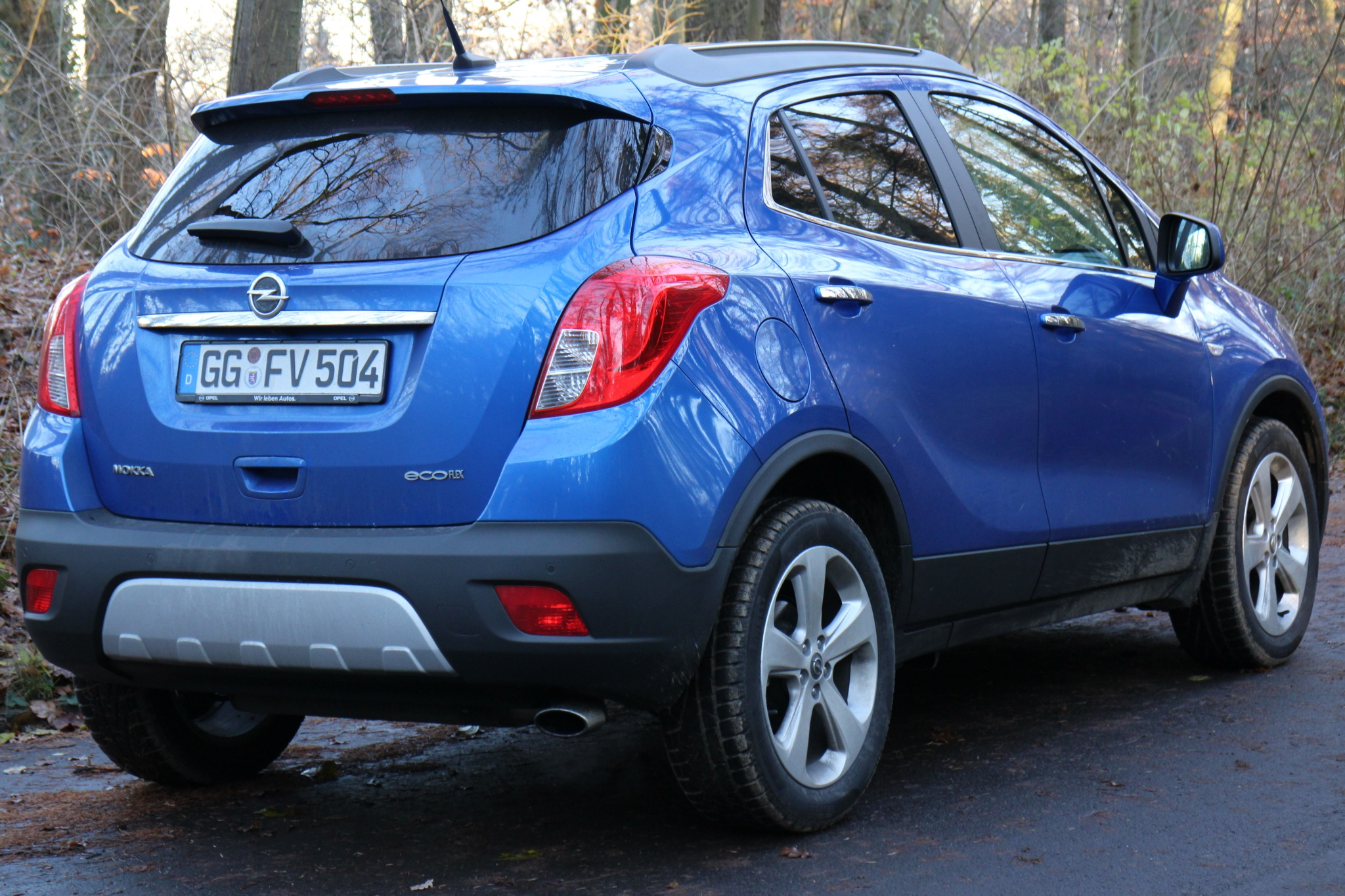 Opel Mokka 1.4 EcoFlex